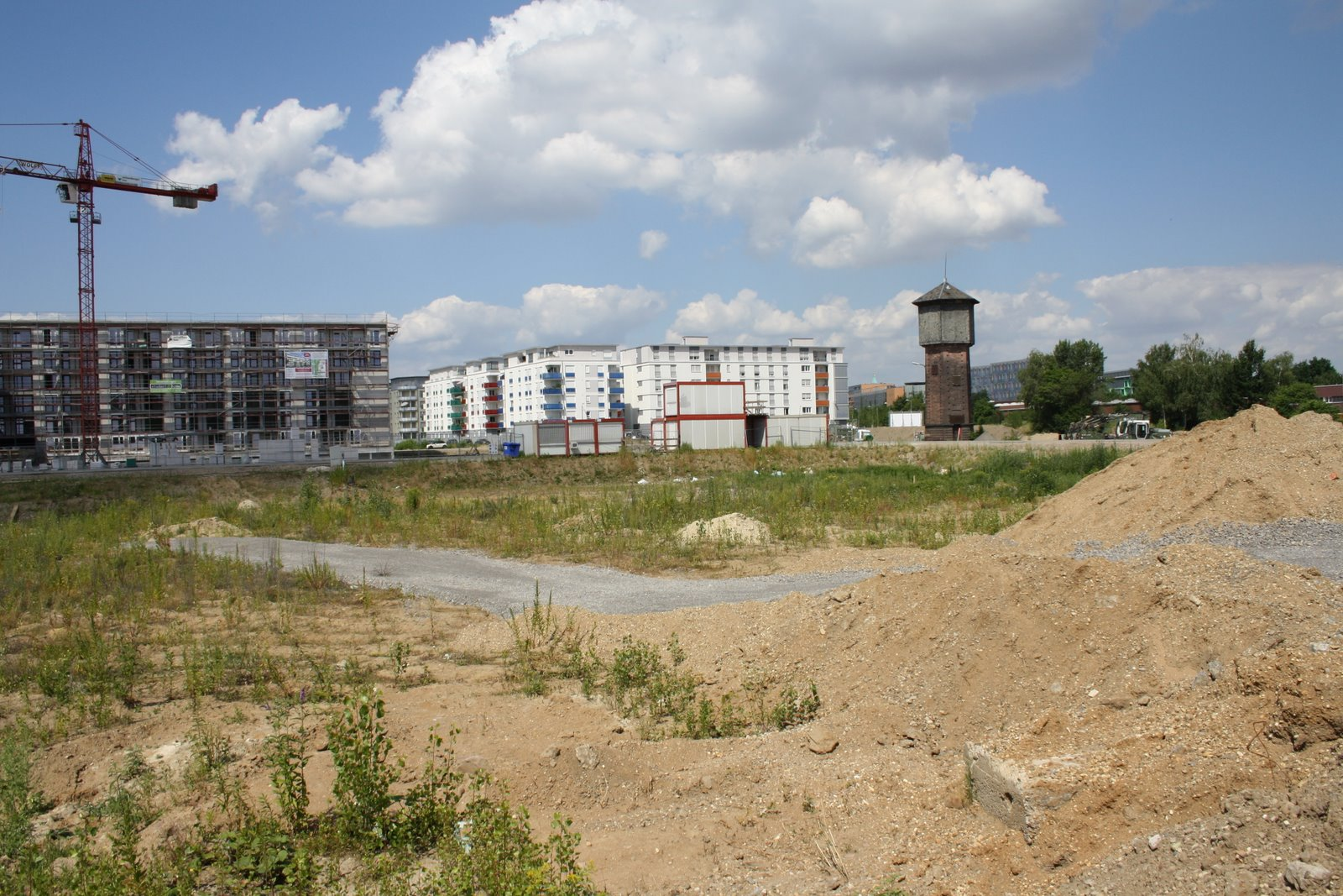 City Park KA, ehemaliges Gelände Ausbesserungswerk Karlsruhe